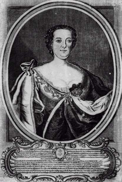 Portrait of Franciszka Urszula Wiśniowiecka (1705-1753)